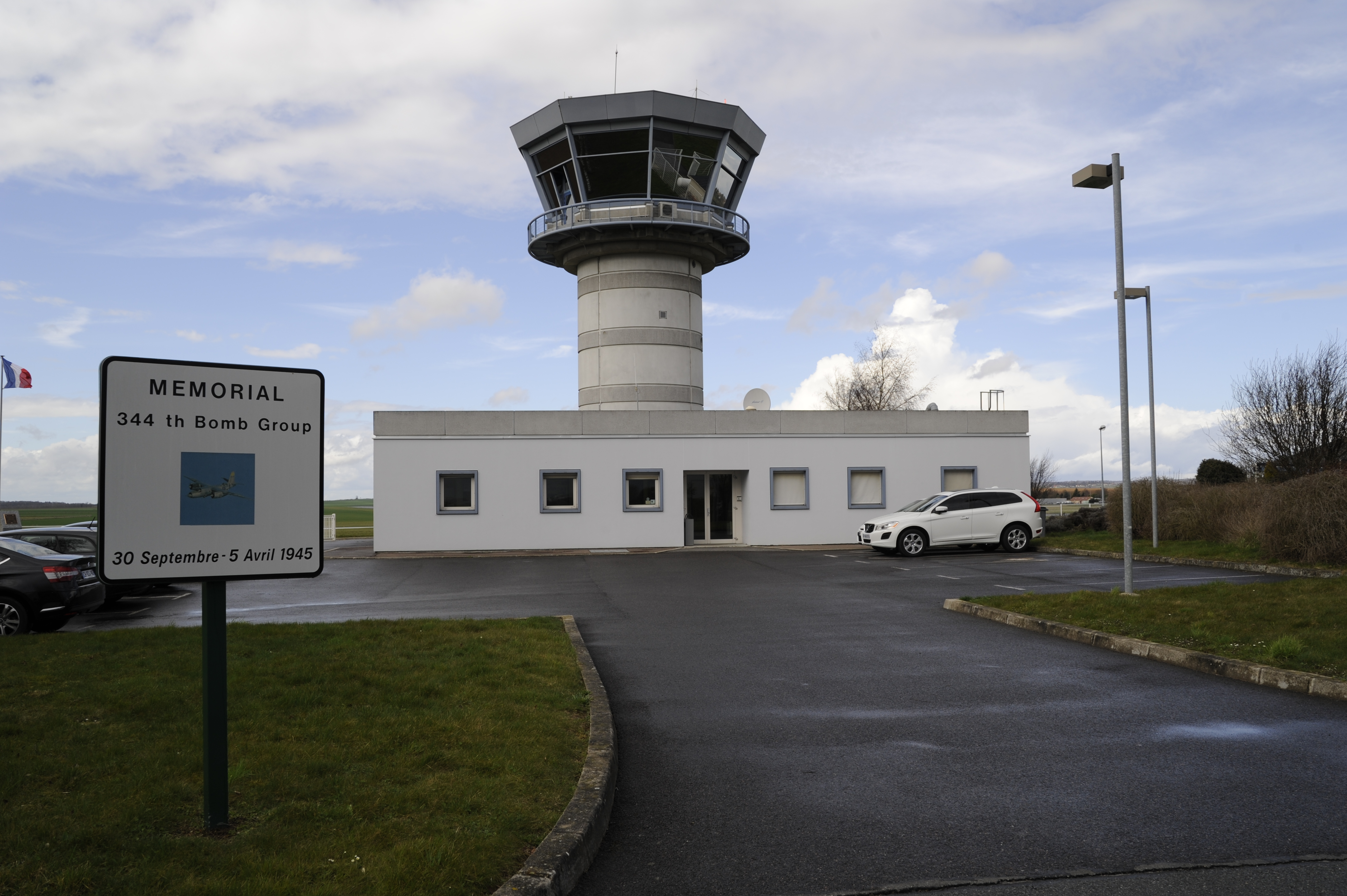 Tour de contrôle LFPT Pontoise-Cormeilles-en-Vexin